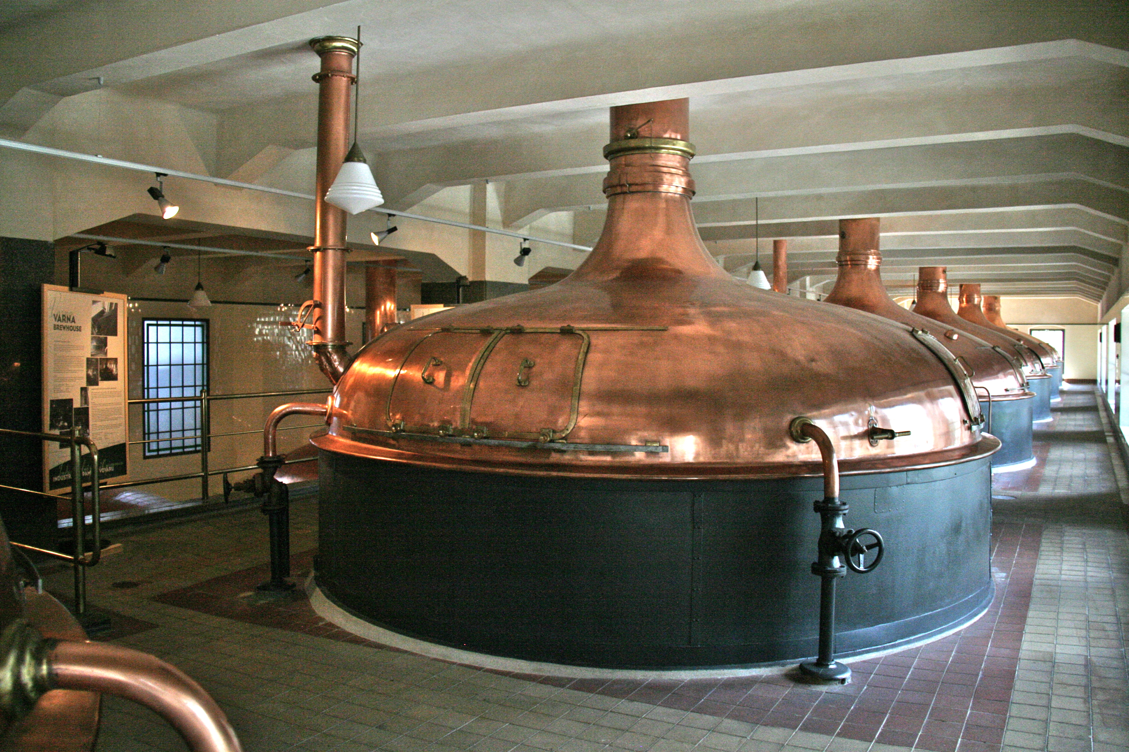 Maceradores en la Cervezería de Pilsen